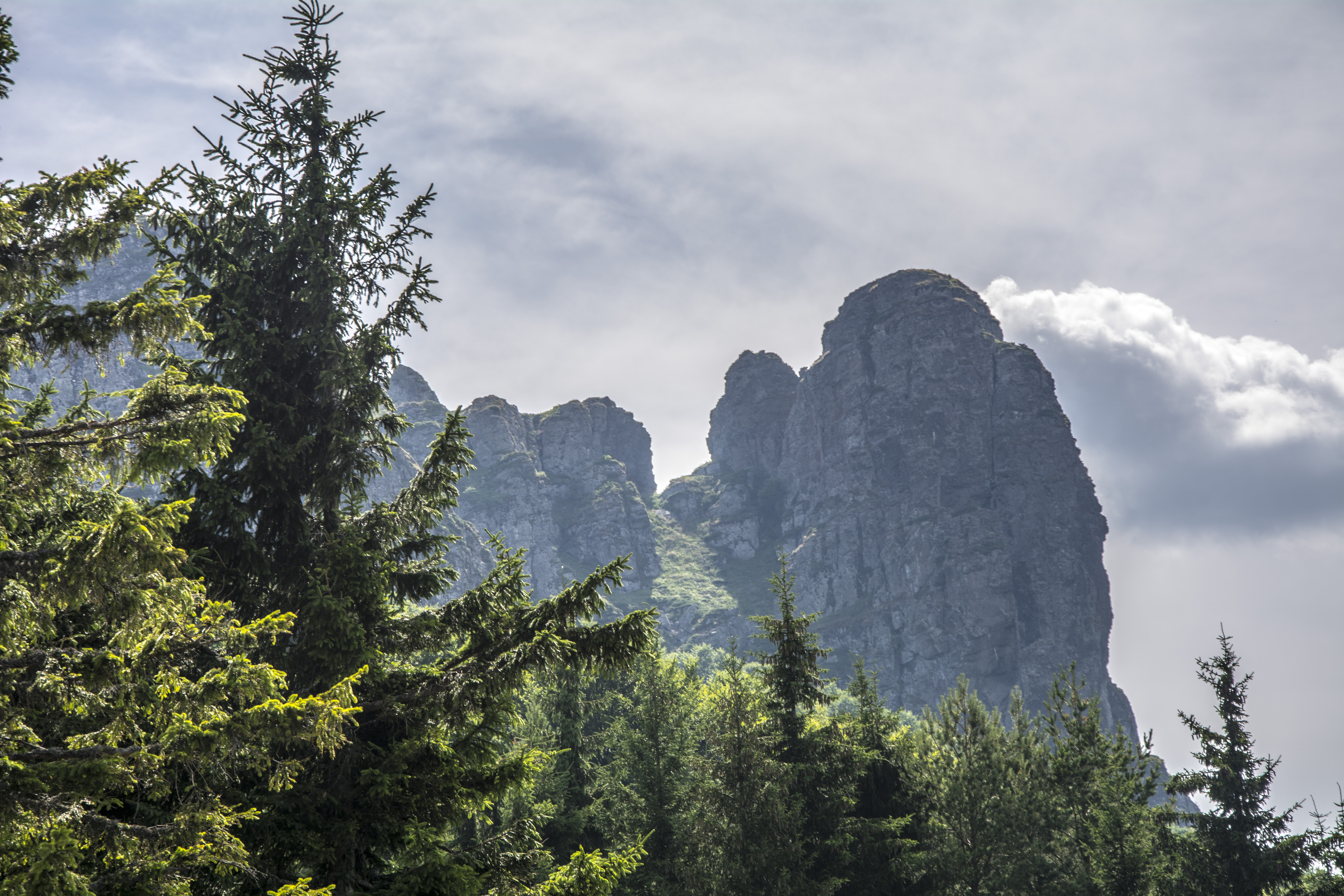 Babin zub u daljini